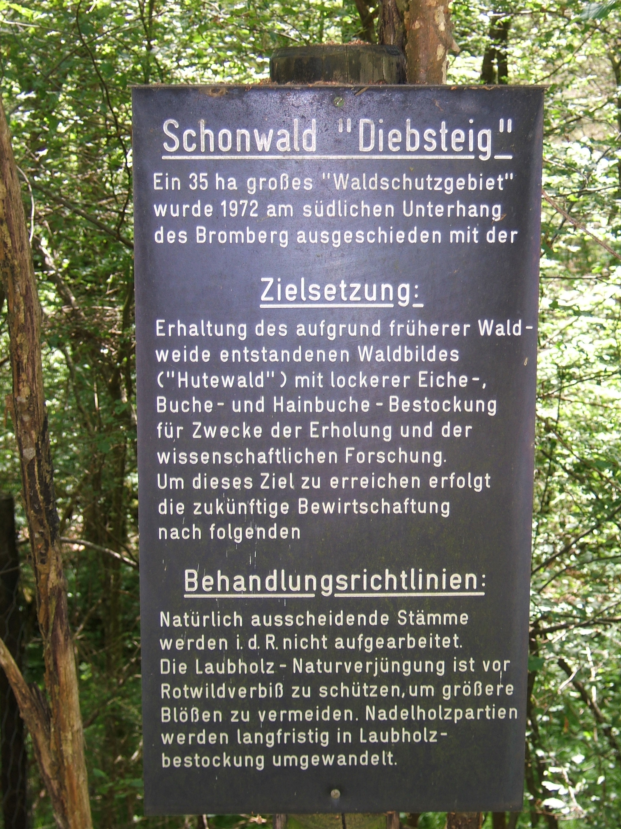 Hinweisschild "Schonwald Diebsteig" im Schönbuch